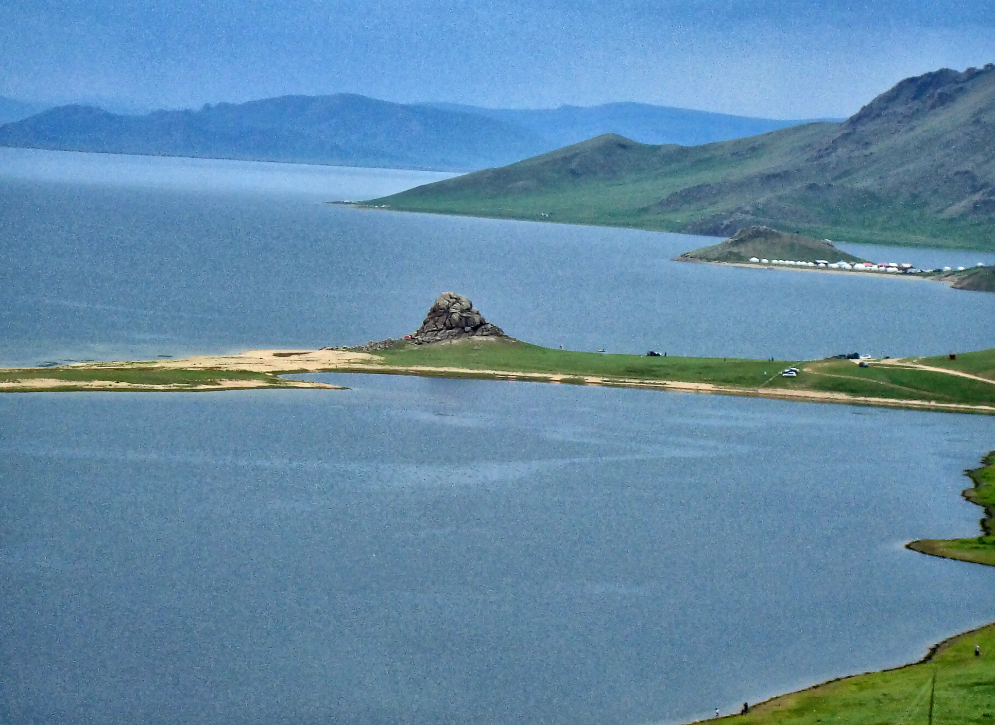 Terkhijn Tsagaan Nuur1